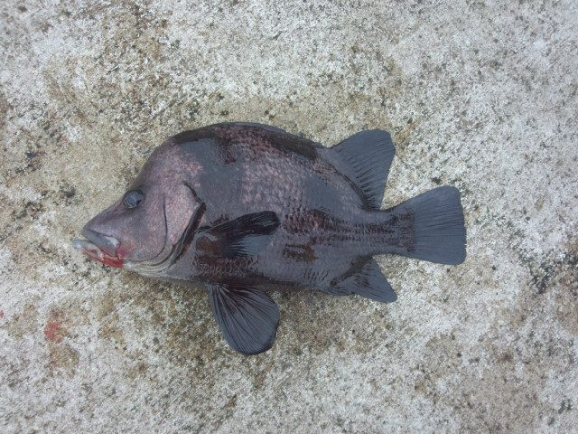 スズキ目スズキ亜科イサキ科ヒゲダイ属 japan miyakeIsland Fishing(Release)